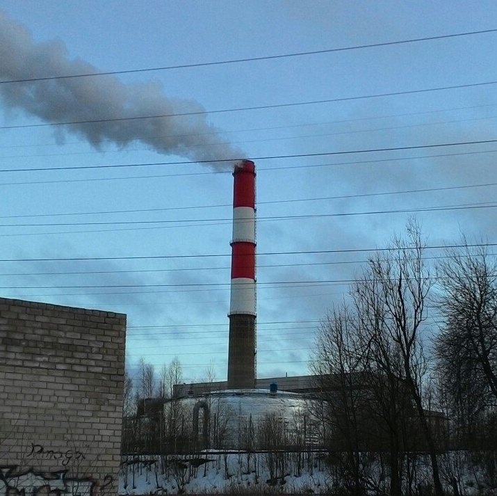 ТЭЦ сулажгоры